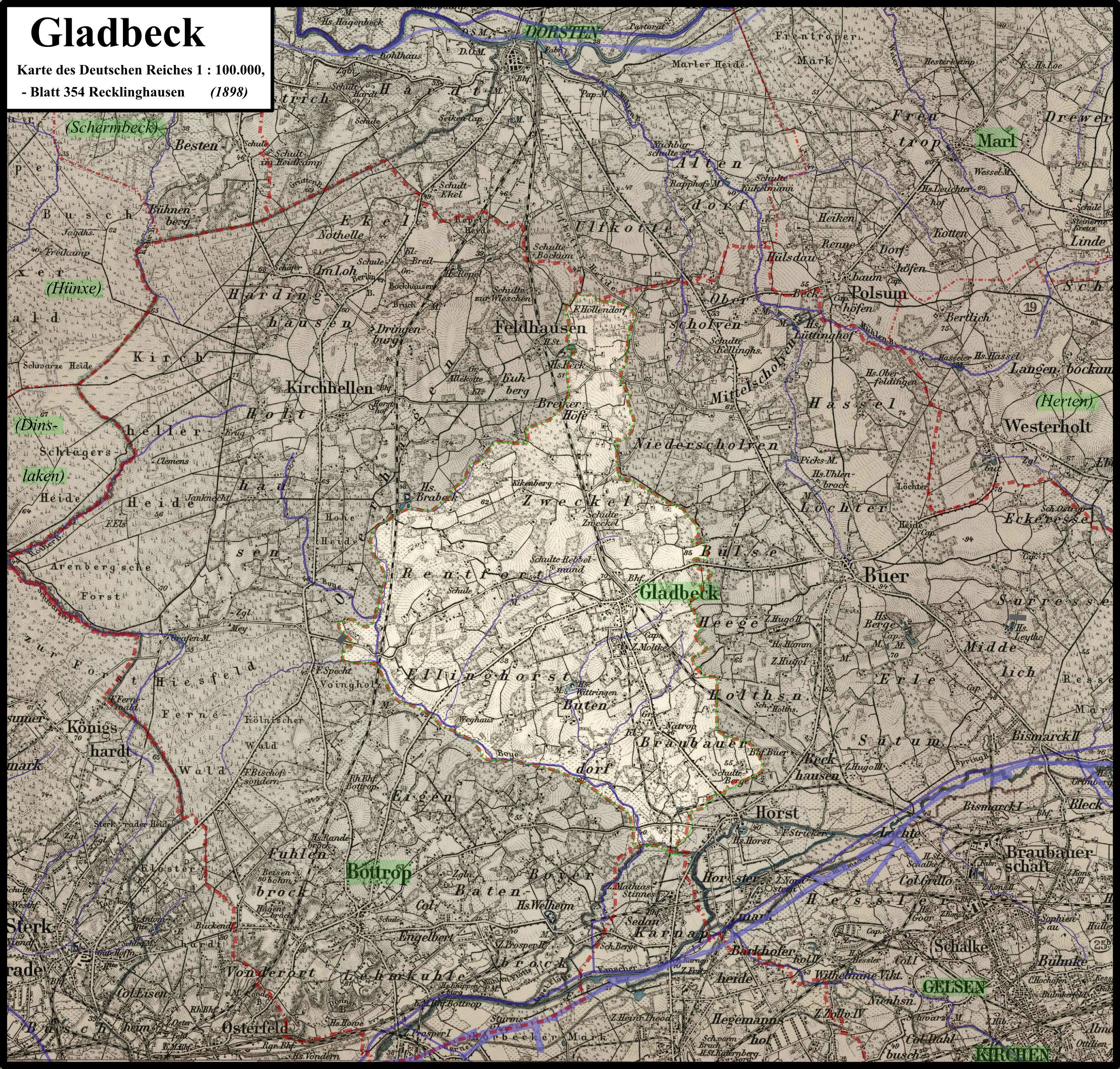 Karte der Stadt Gladbeck auf Basis der Karte des Deutschen Reiches| 1 : 100.000, Ende des 19. Jahrhunderts;Verwaltungsgrenzen (rot), Kanäle, Flüsse und Seen entsprechen dem heutigen Stand/Verlauf; heutige Stadtnamen sind hellgrün hervorgehoben (damalige Stadtnamen in Großbuchstaben), aufgehellt und hellgrün umgrenzt ist die heutige Stadt Gladbeck.